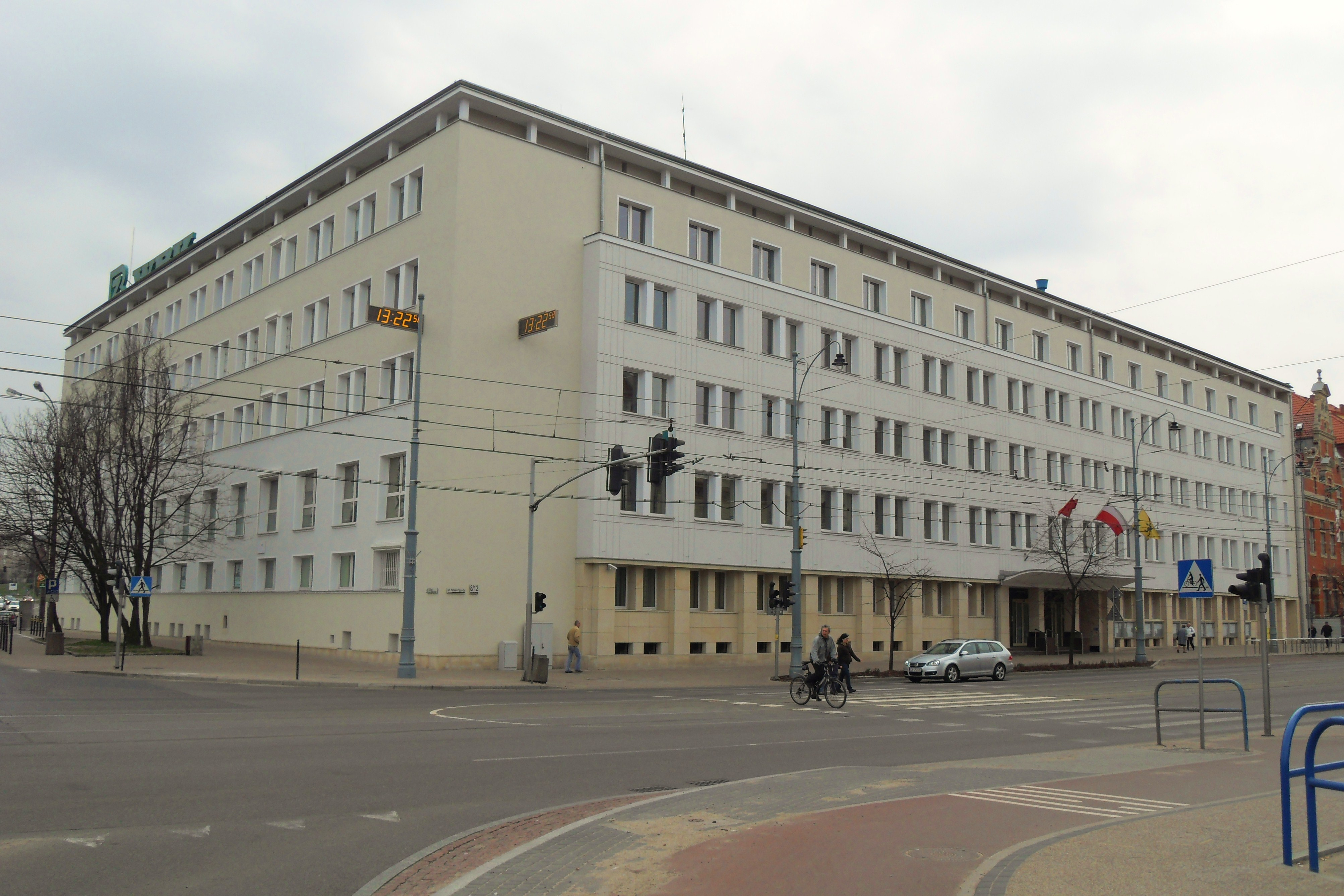 Gdańsk, ul. Nowe Ogrody 8/12.